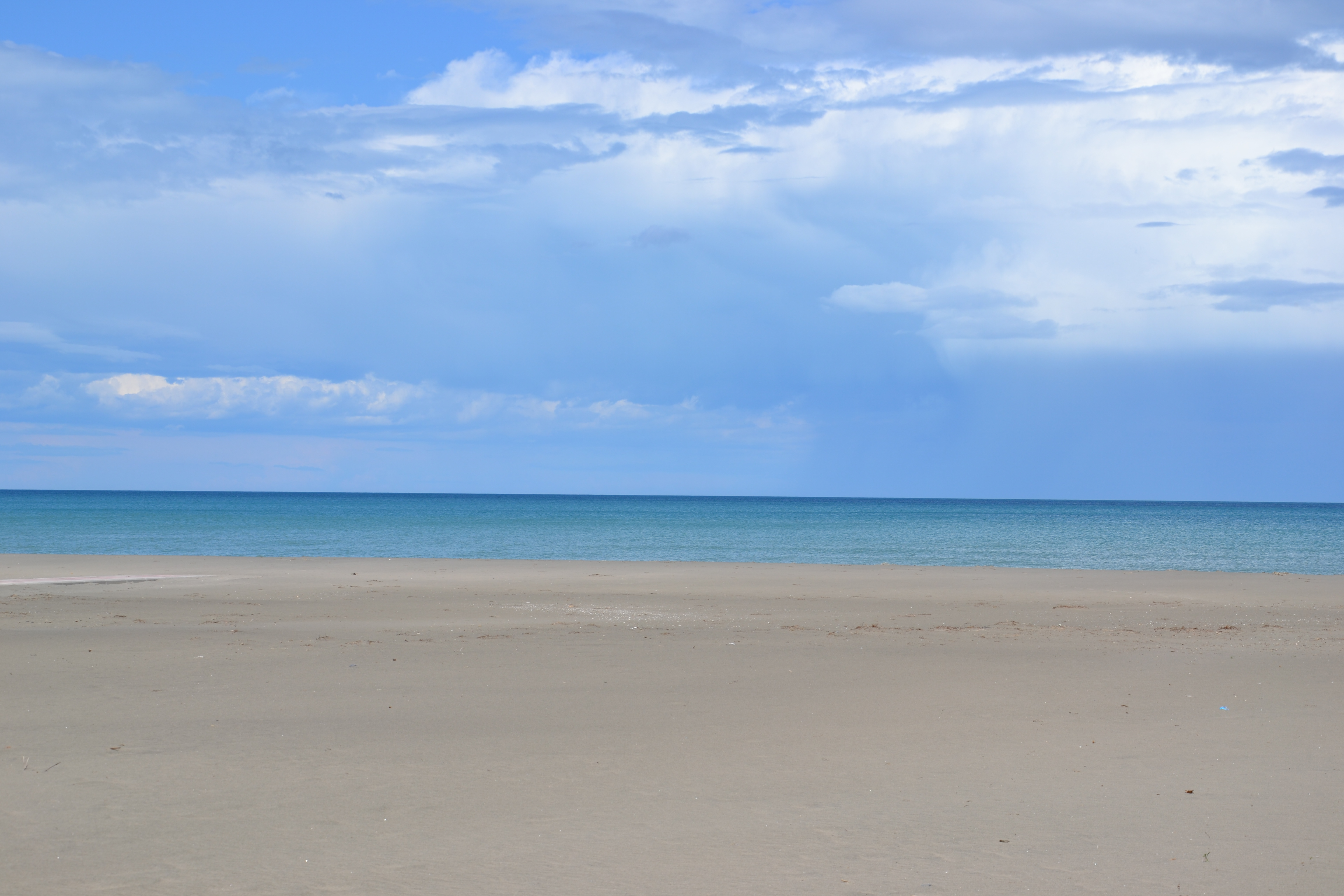 Beach: Margherita di Savoia (BT)